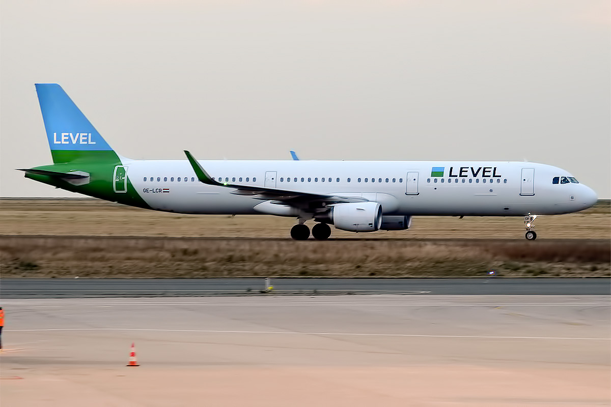 LEVEL, OE-LCR, Airbus A321-211